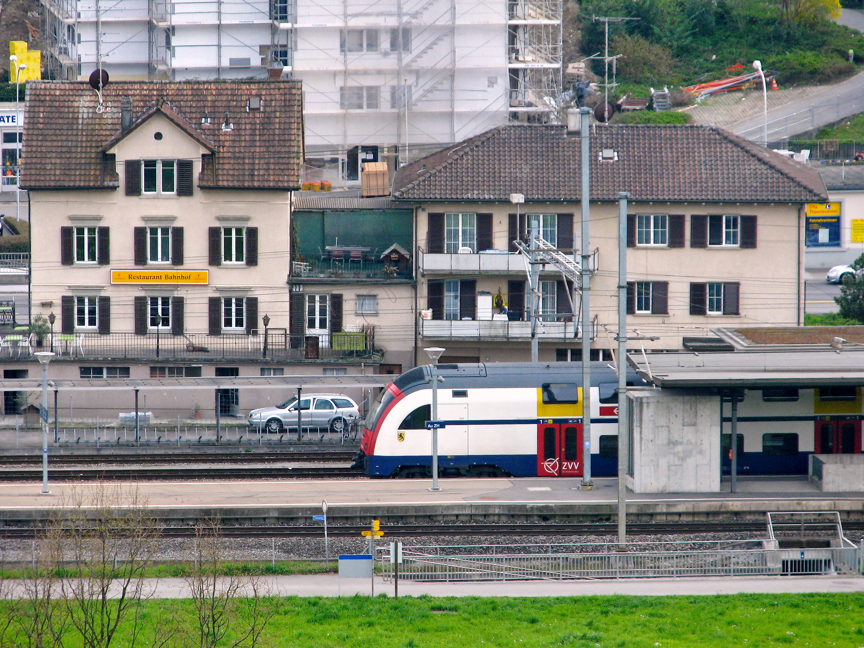 Au (Switzerland), as seen from Halbinsel Au